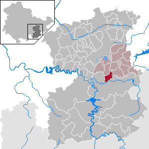 Görkwitz in Thuringia - Saale-Orla-Kreis